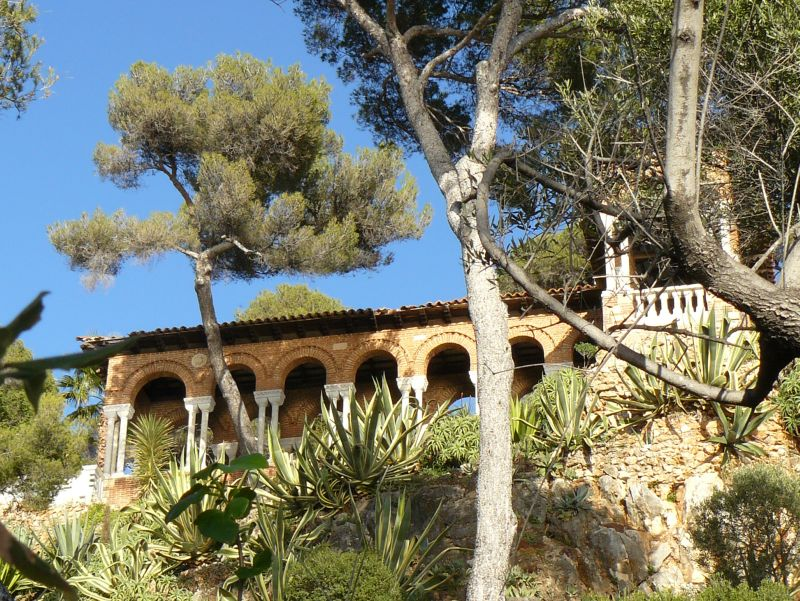 La villa Torrentina, au cap Martin